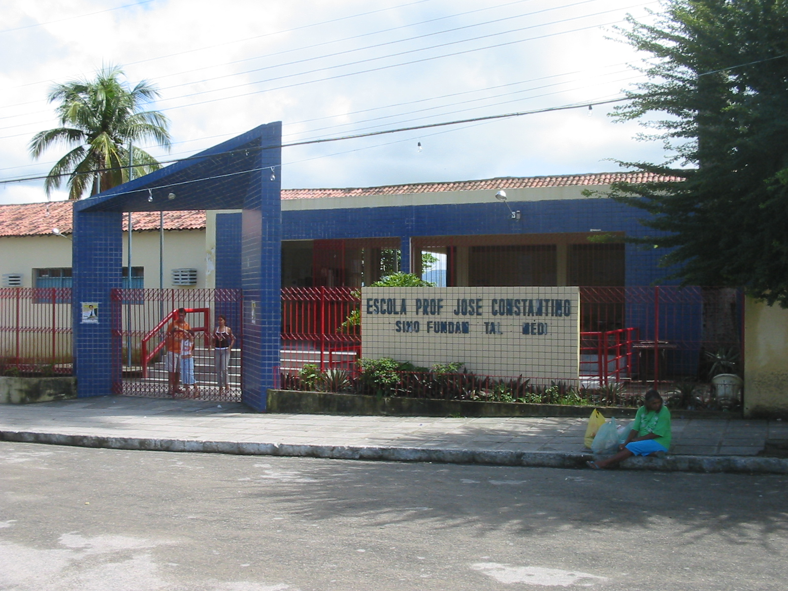 Agrestina (Pernambuco), Brasil. Escola Professor José Constantino. Agrestina (Pernambuco), Brazil. Teacher José Constantino School.